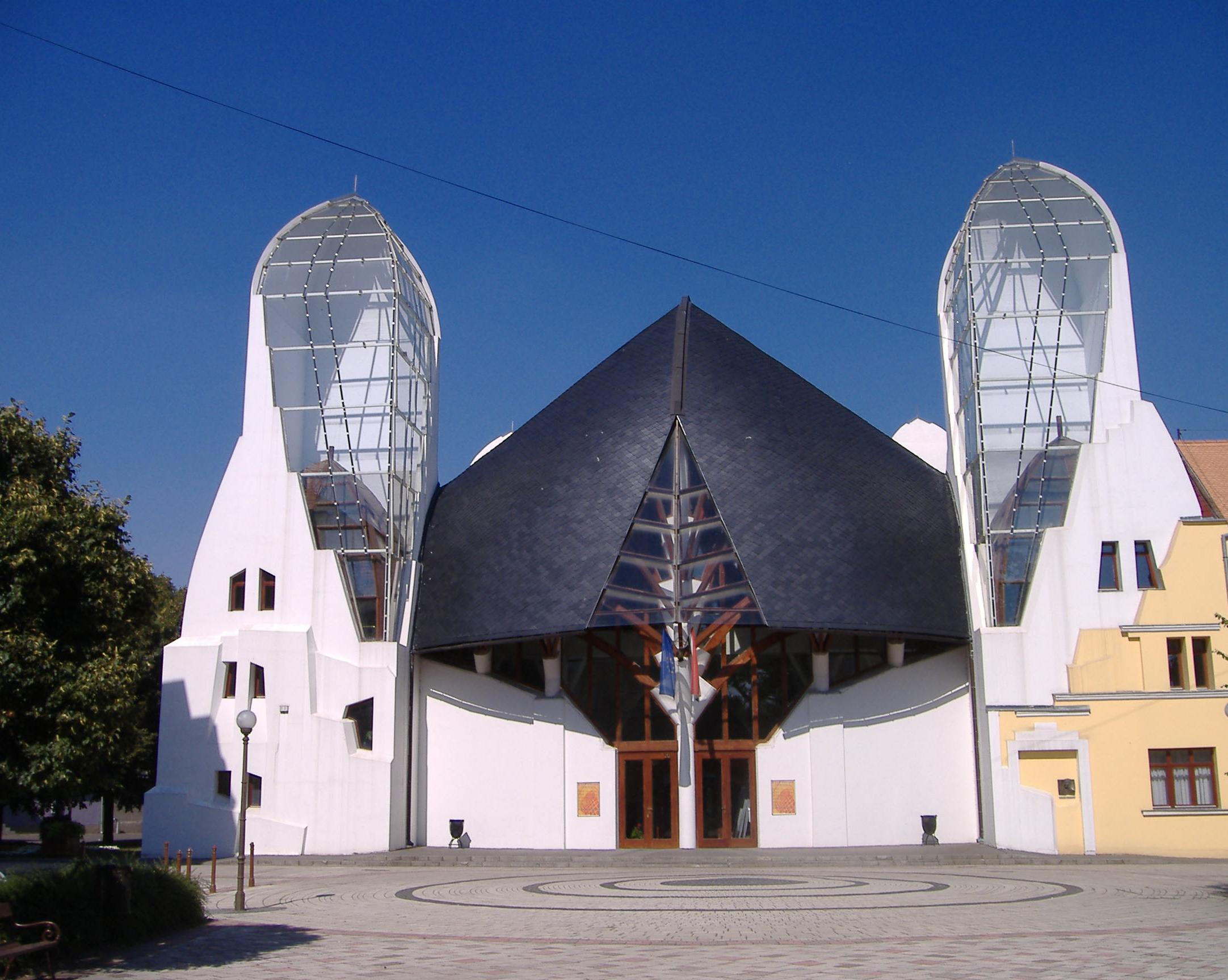 A makói Hagymaház fotója.